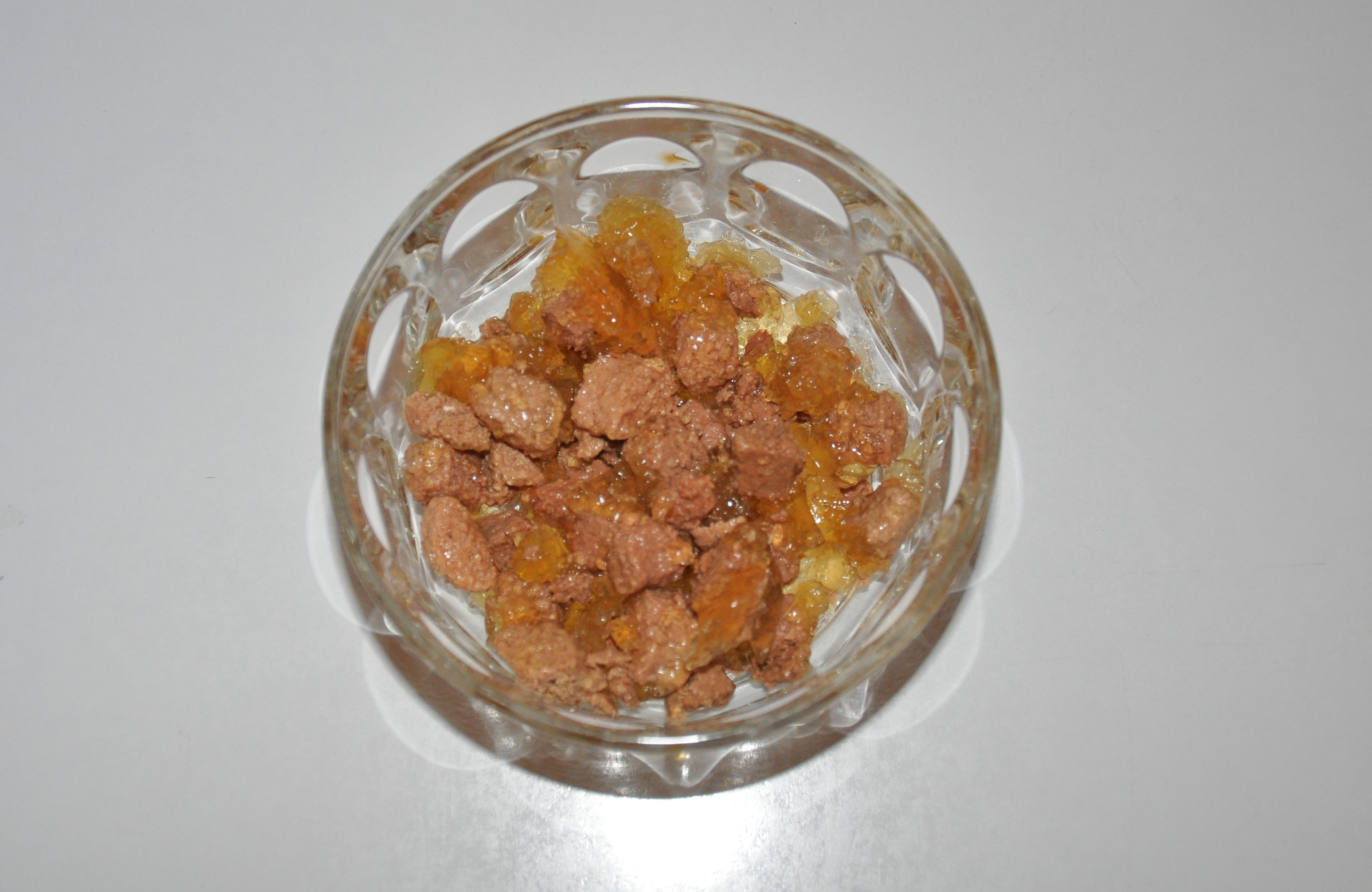 Nassfutter für Katzen in einer Schale